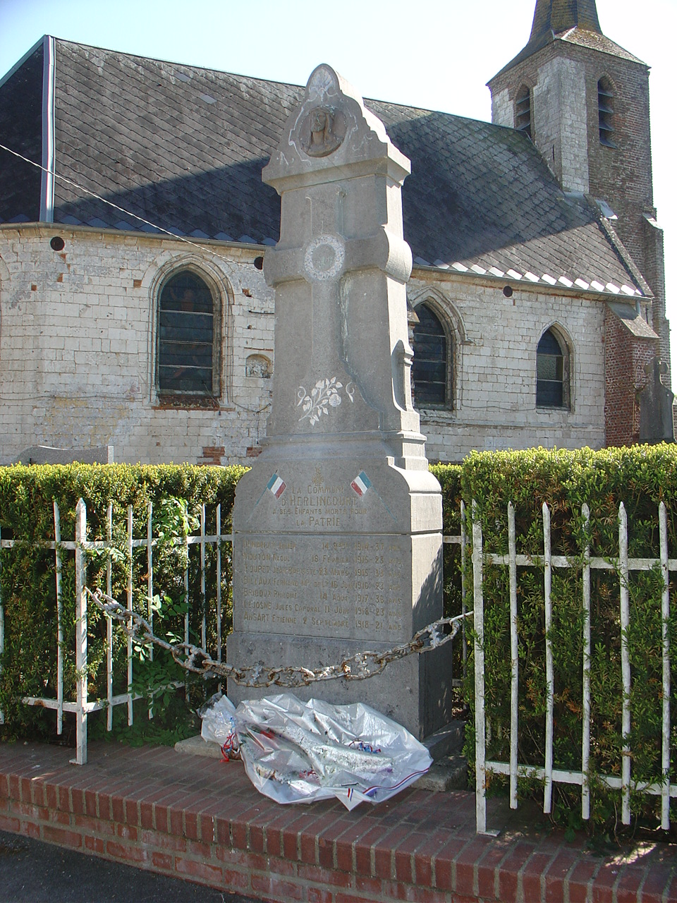 Monument aux morts d'Herlincourt